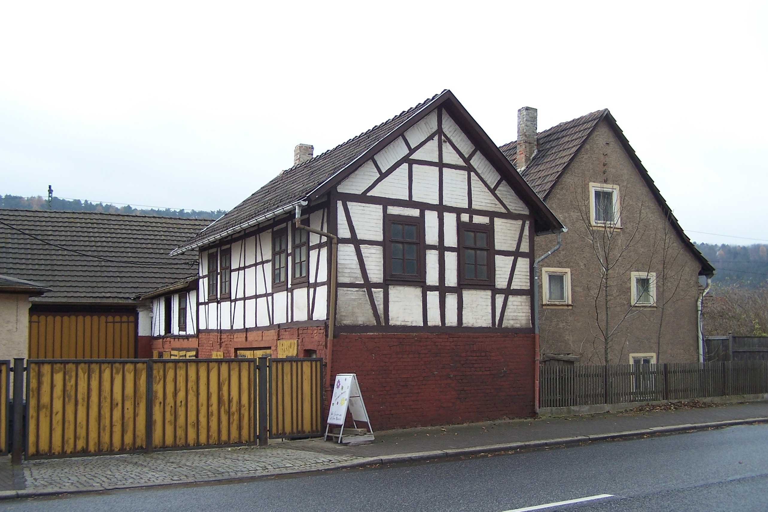 Die westlichen Nebengebäude.